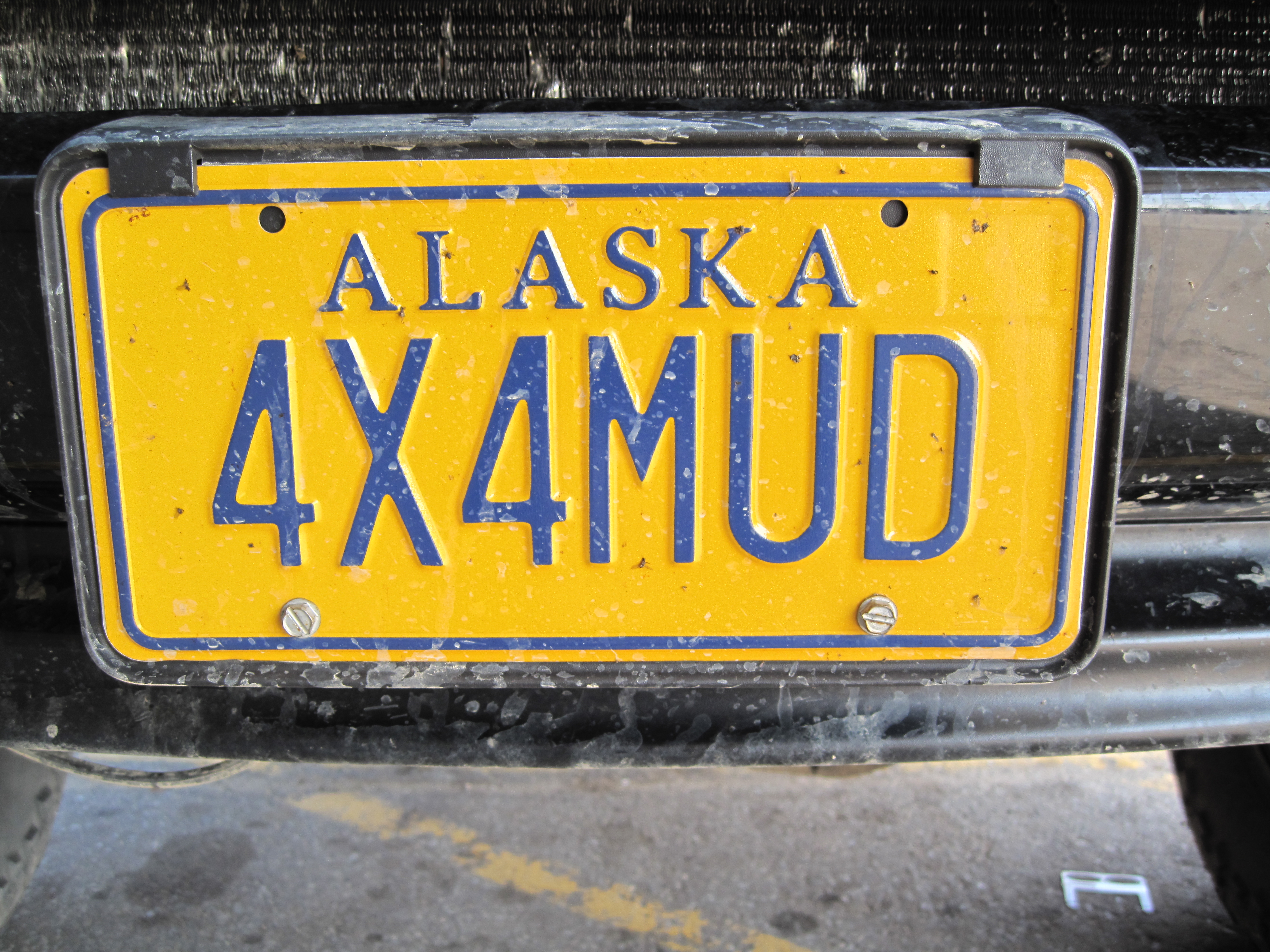 USA licenseplate Alaska